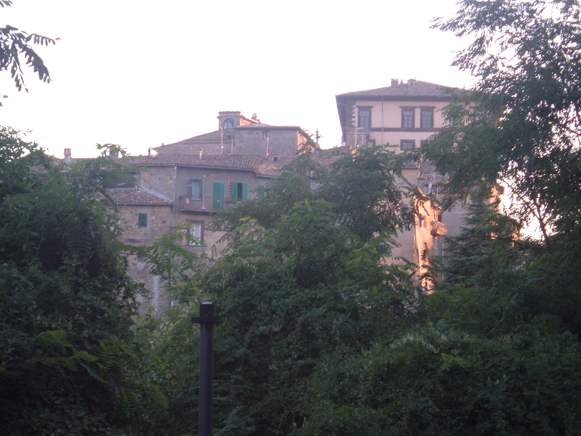 Il centro storico di Gradoli visto da Via Roma